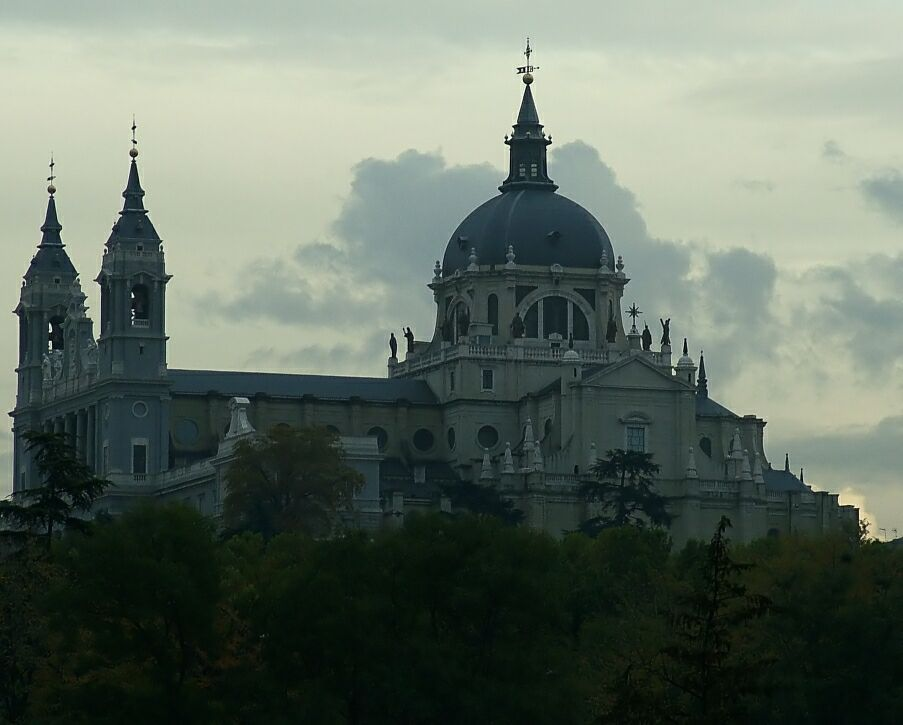 la Catedral de la Almudena (Santa María la Real de La Almudena) od strony Casa de Campo